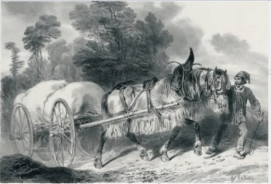 Un attelage franc-comtois en 1850